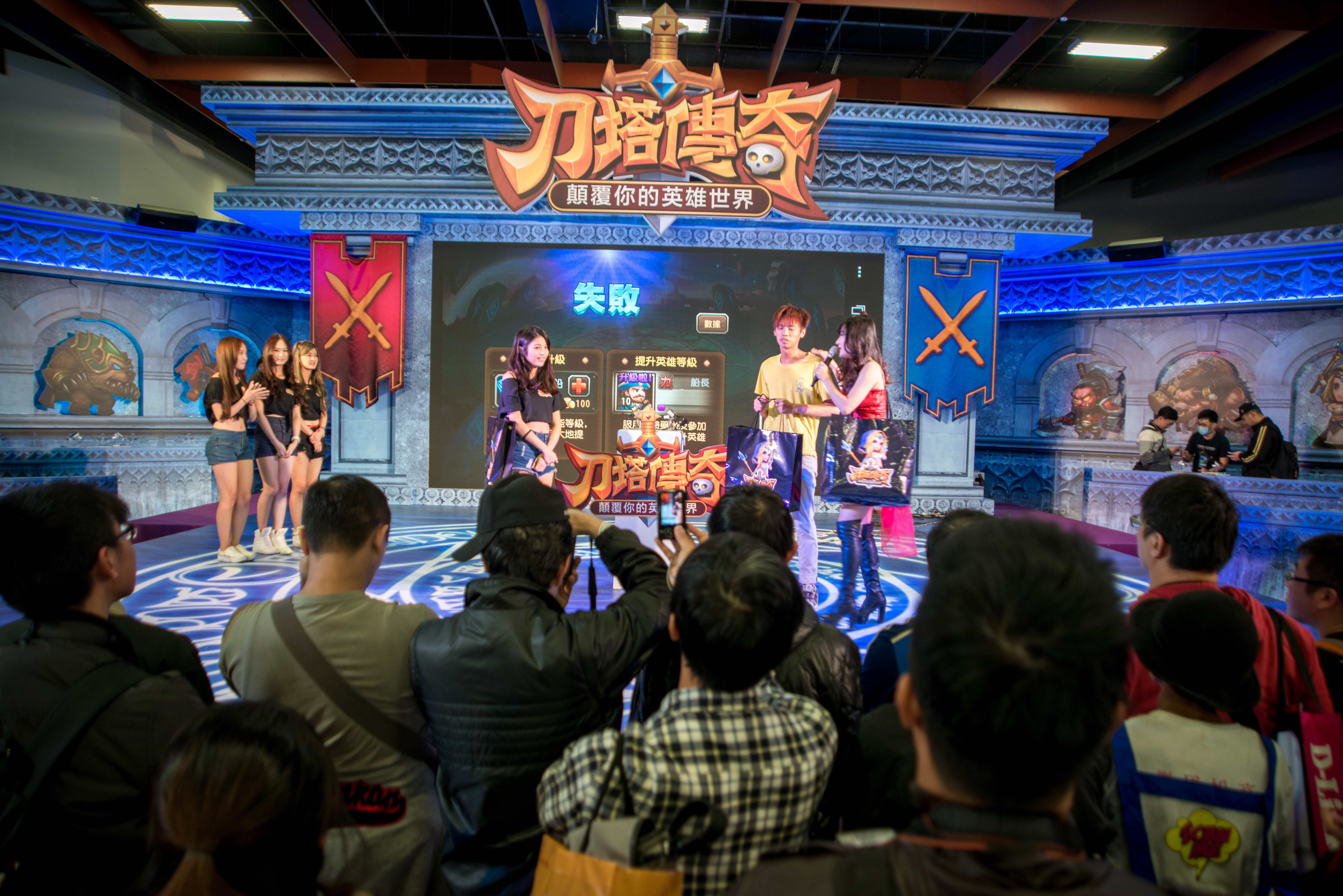 2014台北資訊月，《刀塔傳奇》攤位舞台活動。